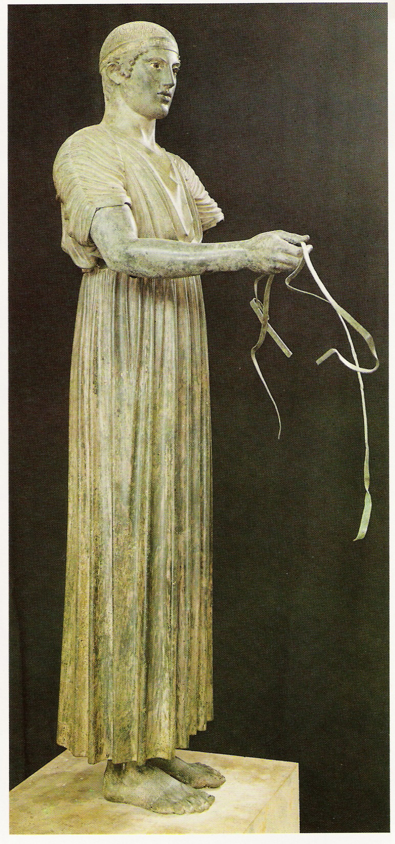 immagine proveniente da archivio personale e pertanto autorizzata ad essere di pubblico dominio.